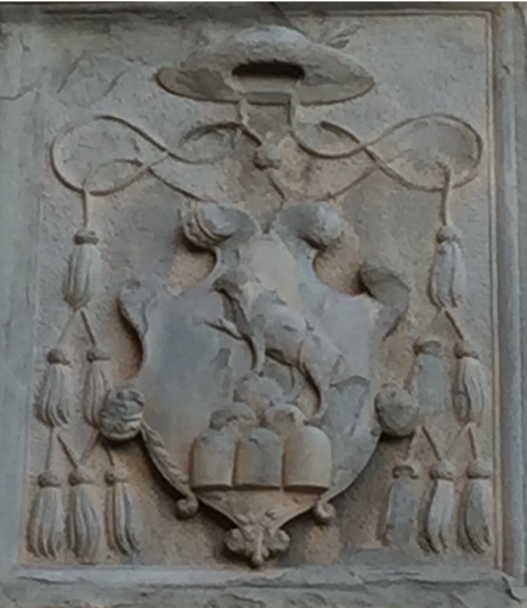 Stemma Passerini di Cortona prima del viaggio di Papa Leone X ospitato dal cardinale Silvio Passerini 1514-1516